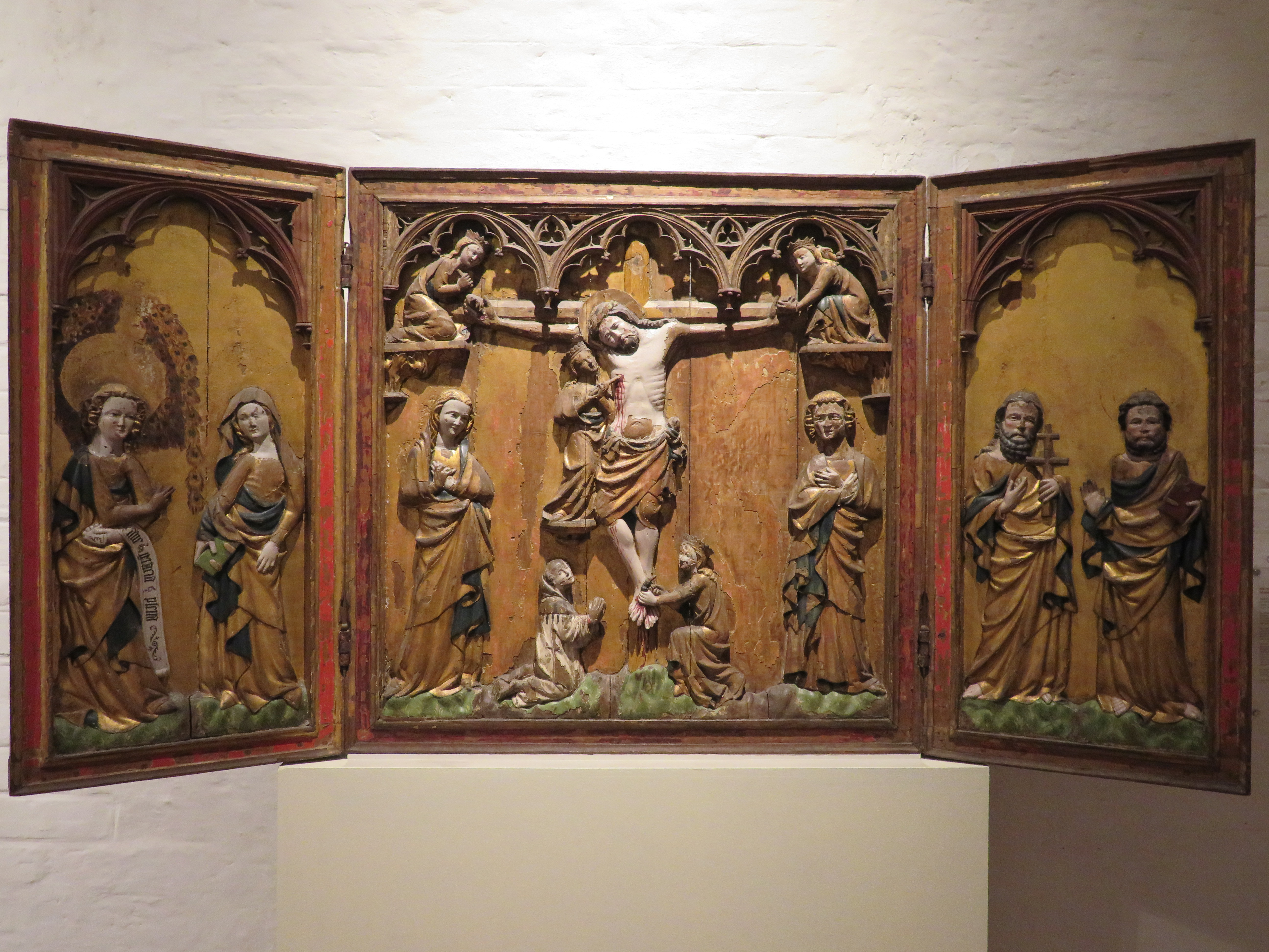 Flügelretabel mit der Tugendenkreuzigung (sog. Warendorp-Altar), um 1340, St.-Annen-Museum Lübeck